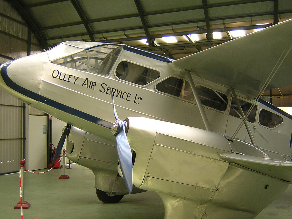 De Havilland 89 "Dragon Rapide" at Museo del Aire, Madrid, Spain